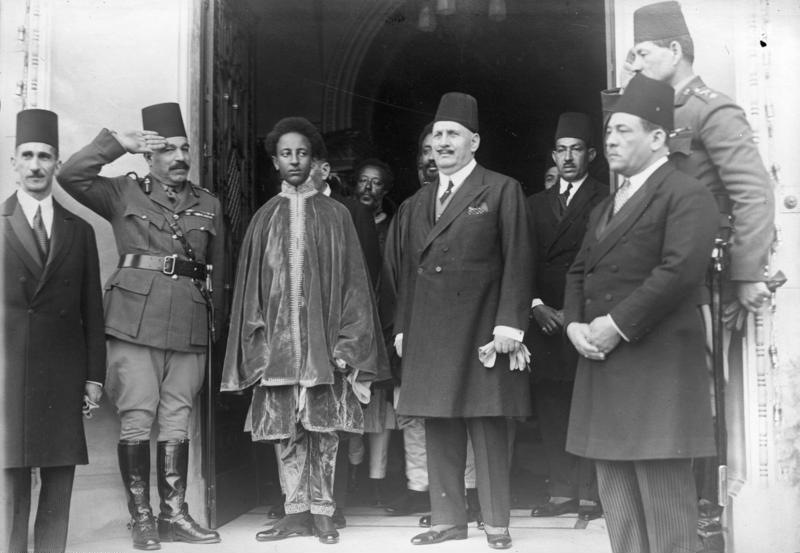 Der Kronprinz von Abessinien Asfau Mossen Haile Selassi, welcher sich vom abessinischen Bischof im Jordan taufen liess, besuchte auf seiner Reise den König von Aegypten. Der Kronprinz von Abessinien (links) mit König Fuad von Aegypten bei seinem Besuch.